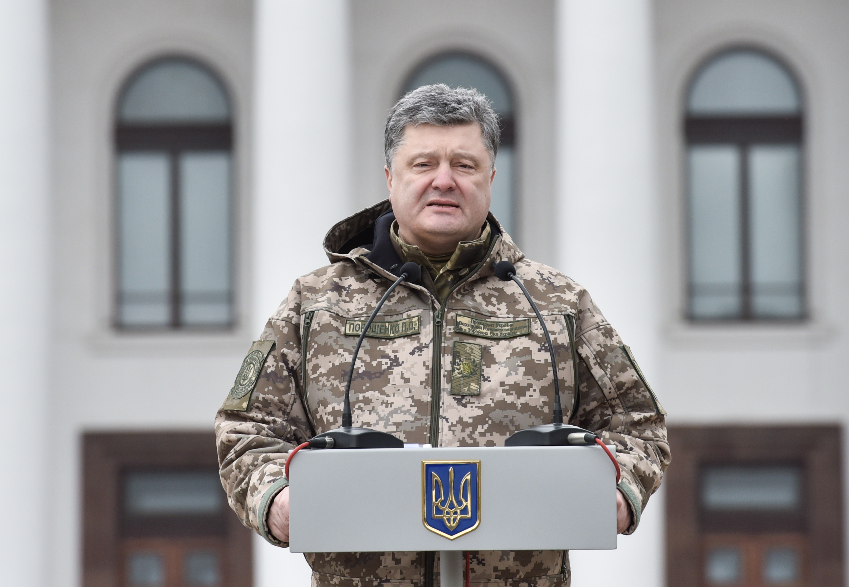 Рабочая поездка Порошенко в Донецкую область